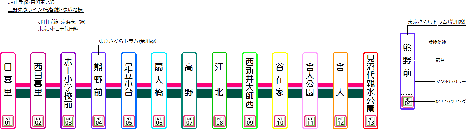 日暮里・舎人ライナーの路線図